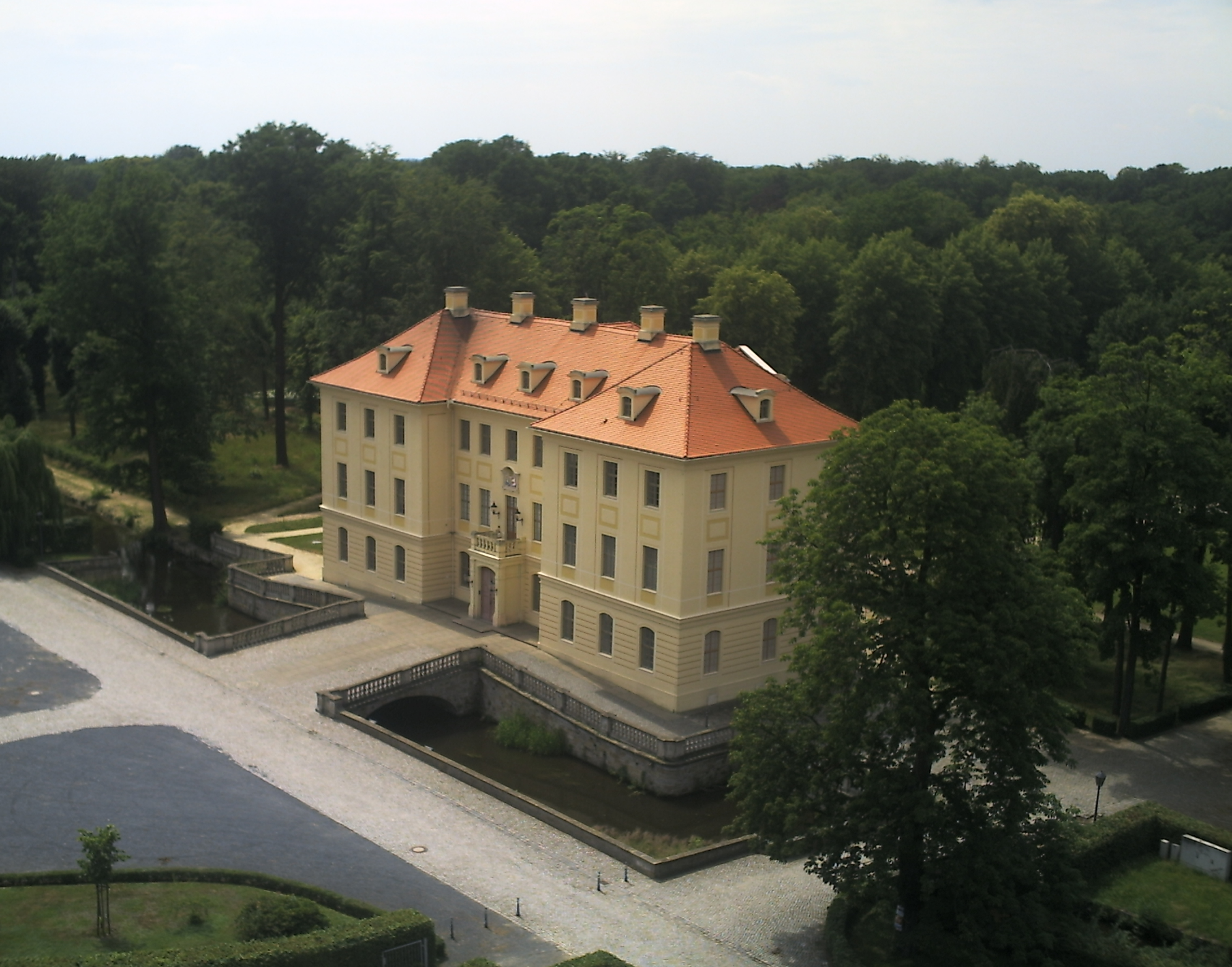 Barockschloß Zabeltitz, im Volksmund „Palais“ genannt